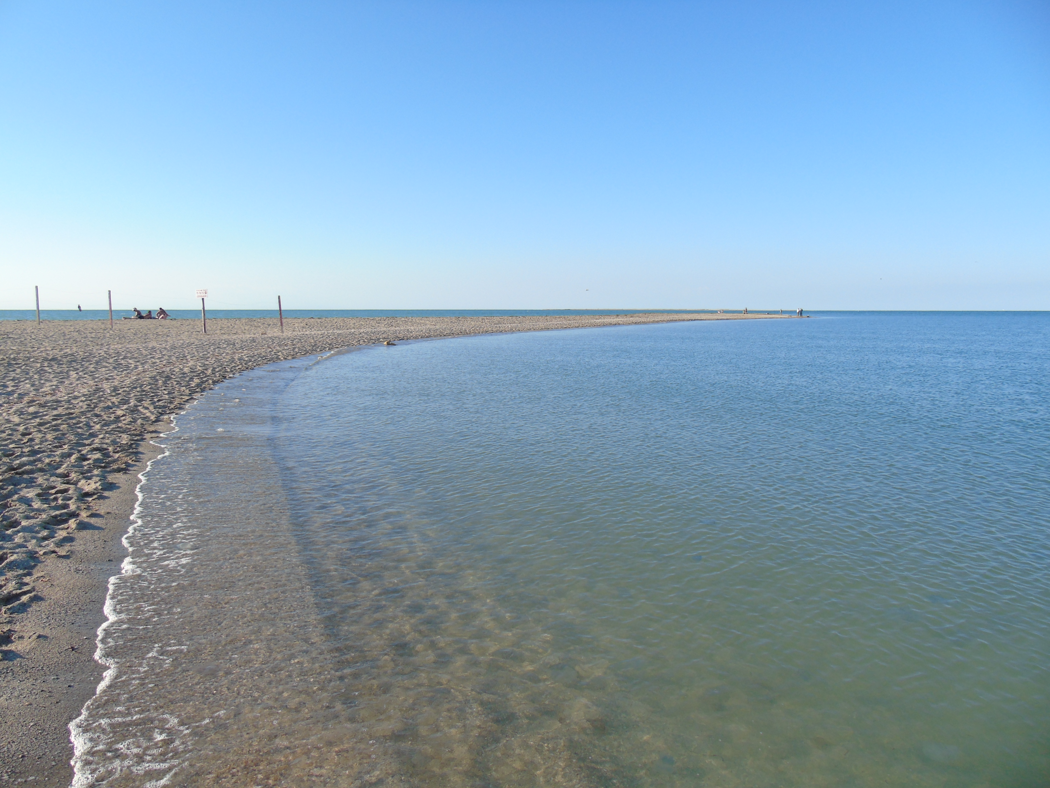 Бакальська коса станом на липень 2017 р. сильно розмита штормами